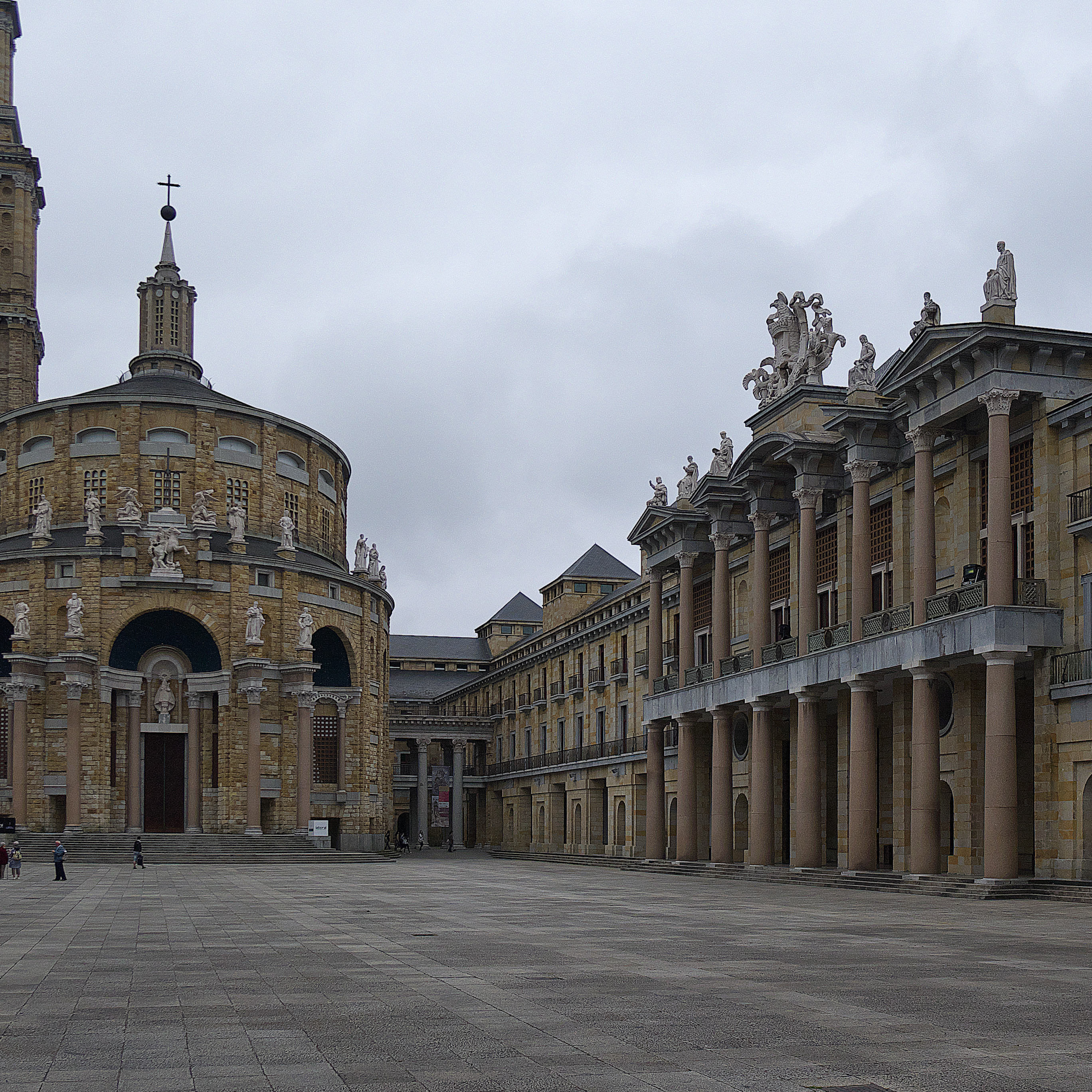 Patio central del edificio